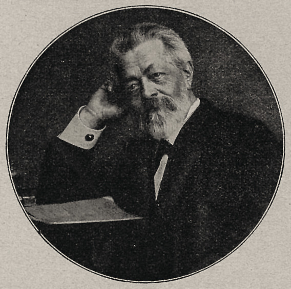 Wilhelm Amandus Beer, Bild mit Nachruf in "Rhein und Düssel" (No. 10) vom 10. März 1907